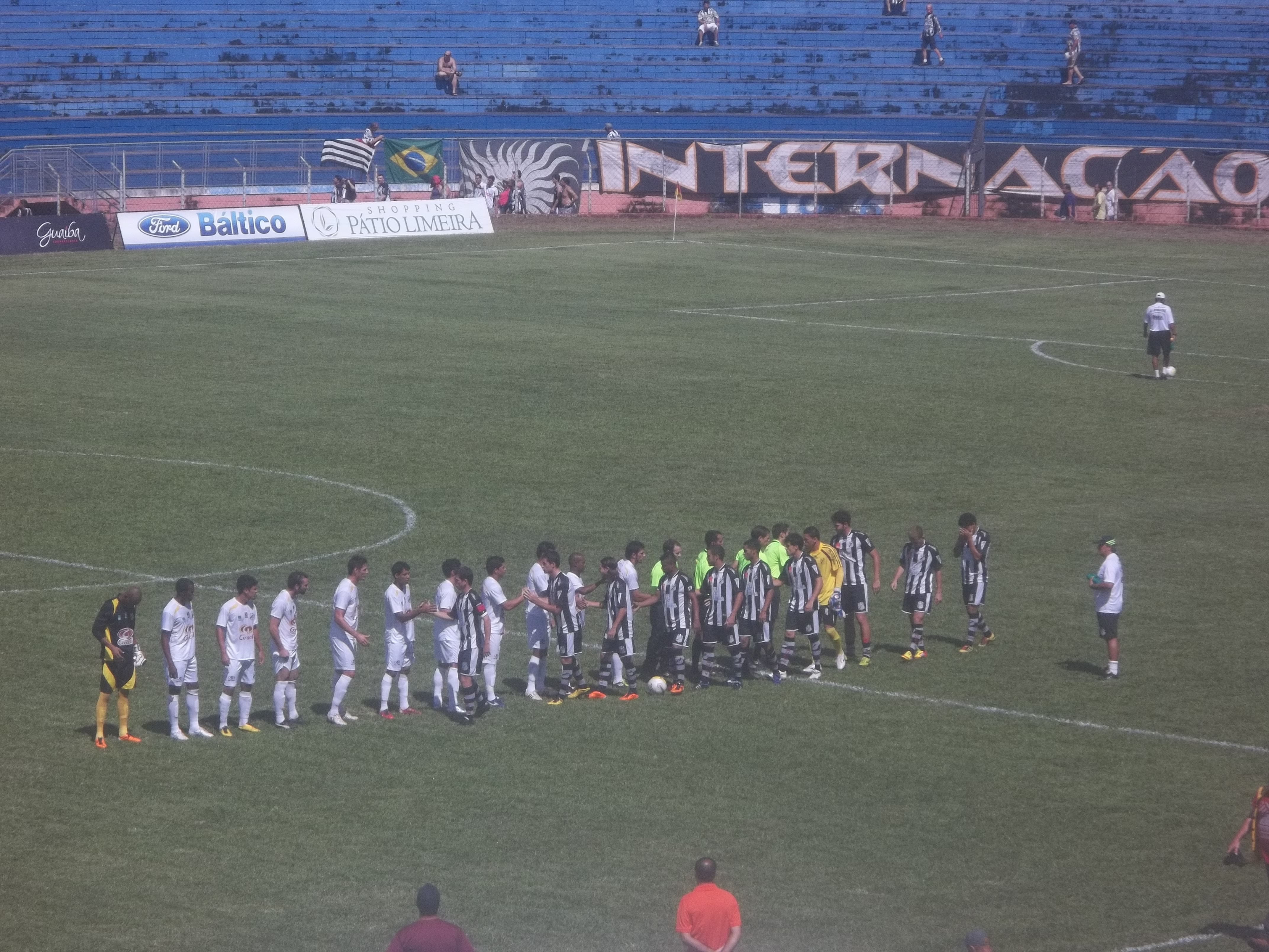 Jogadores da Inter e do Independente de Limeira em clássico válido pela Série A3 do Paulistão de 2012.